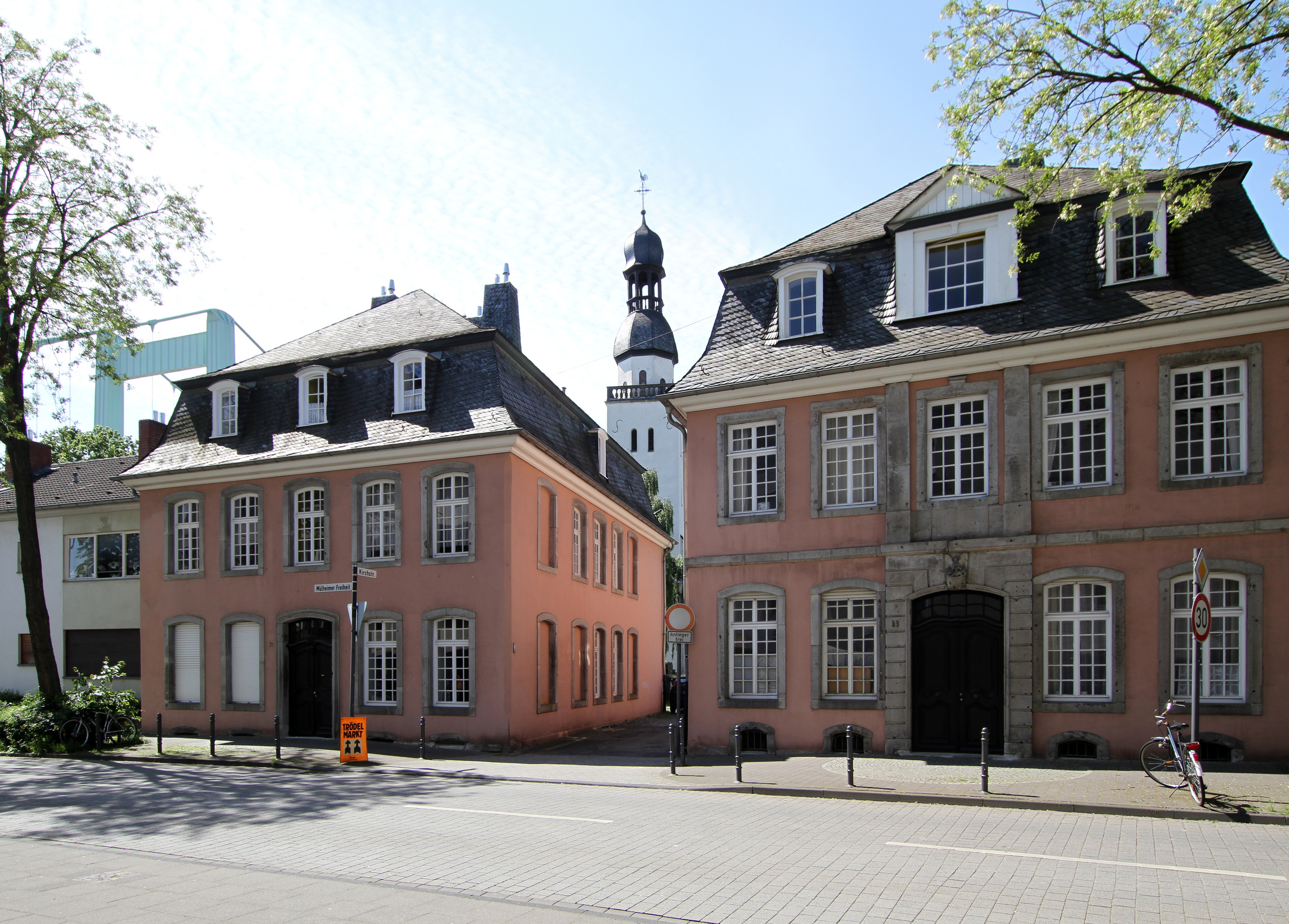 Köln-Mülheim,Mülheimer Freiheit 31 - 33